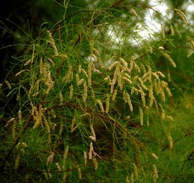 import from pub domain